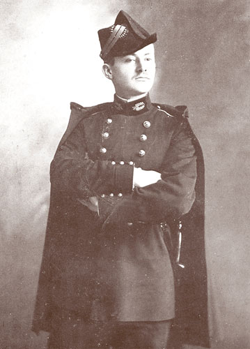 Eugène Freyssinet, ingénieur français, en uniforme de polytechnicien.